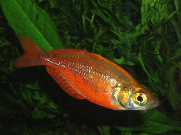 Glossolepis incisus - Lachsroter Regenbogenfisch im Aquarium, männliches Jungtier